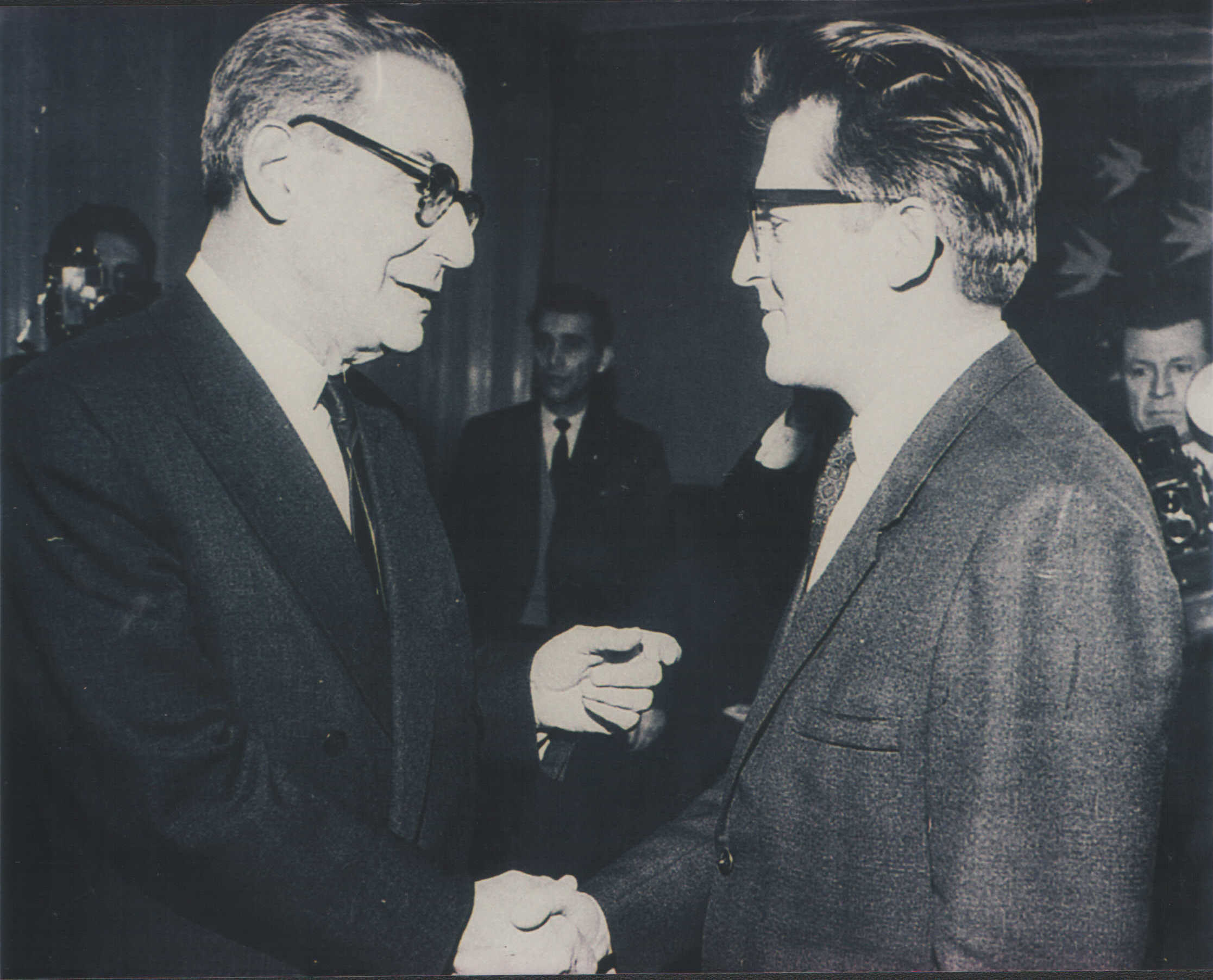 Ivo Andrić i Dobrica Ćosić.foto: Stevan Kragujević (po odobrenju Kćerke Tanje Kragujević)